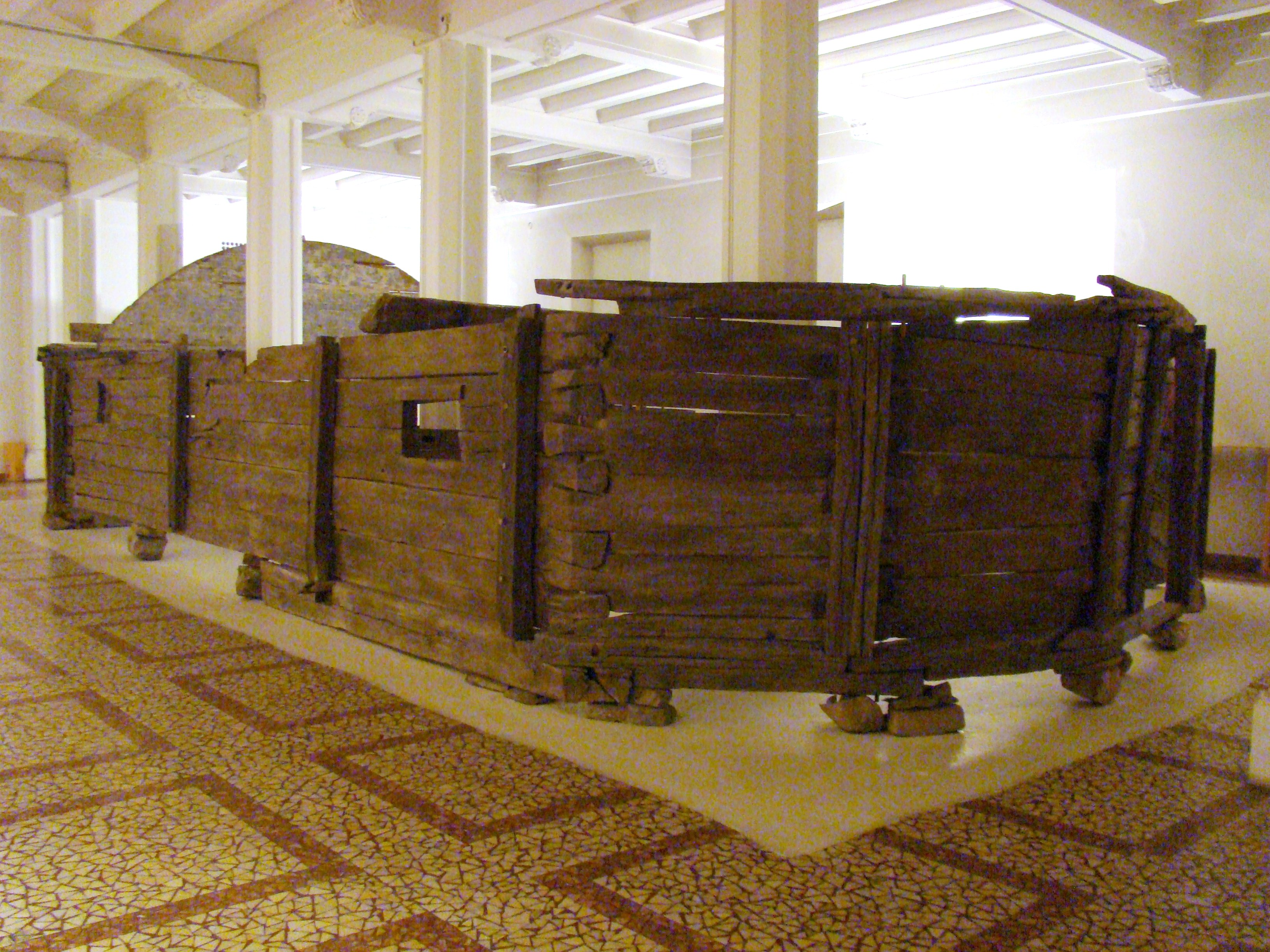 Biserica de lemn din Mintia, Hunedoara, mutată în incinta Muzeului Țăranului Român din București